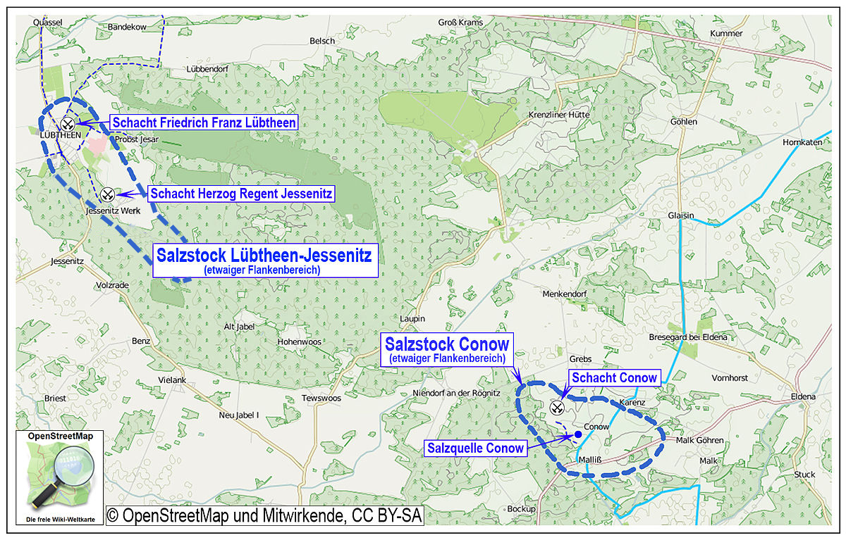 Lage der Kali- und Steinsalzbergwerke in Süd-West-Mecklenburg